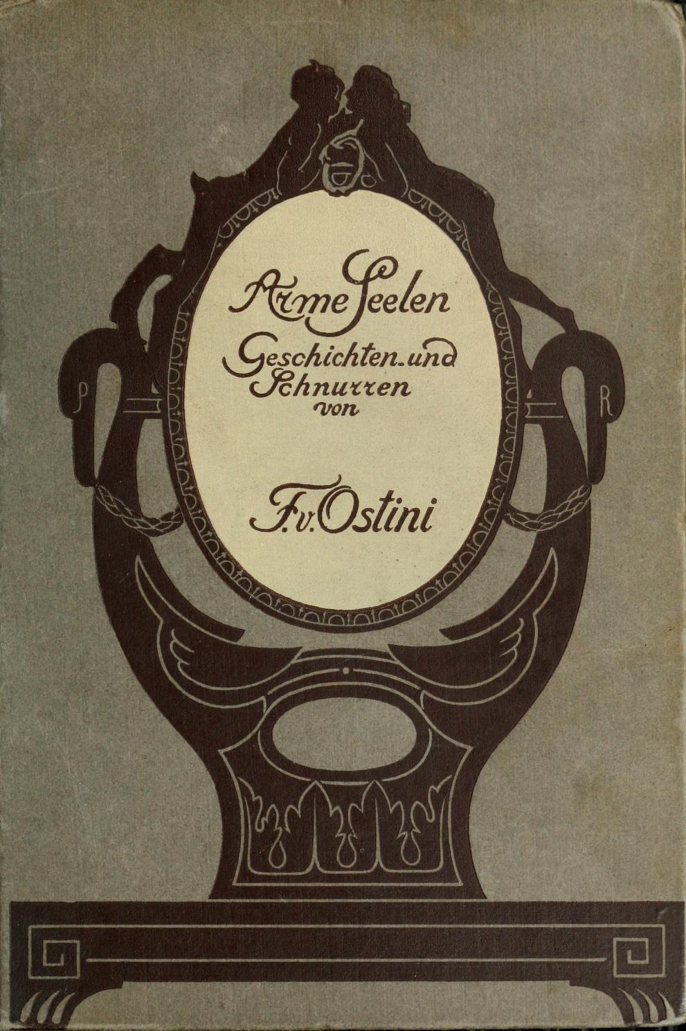 Titelblatt von: Arme Seelen. Geschichten und Schnurren. Stuttgart : A. Bonz, 1910